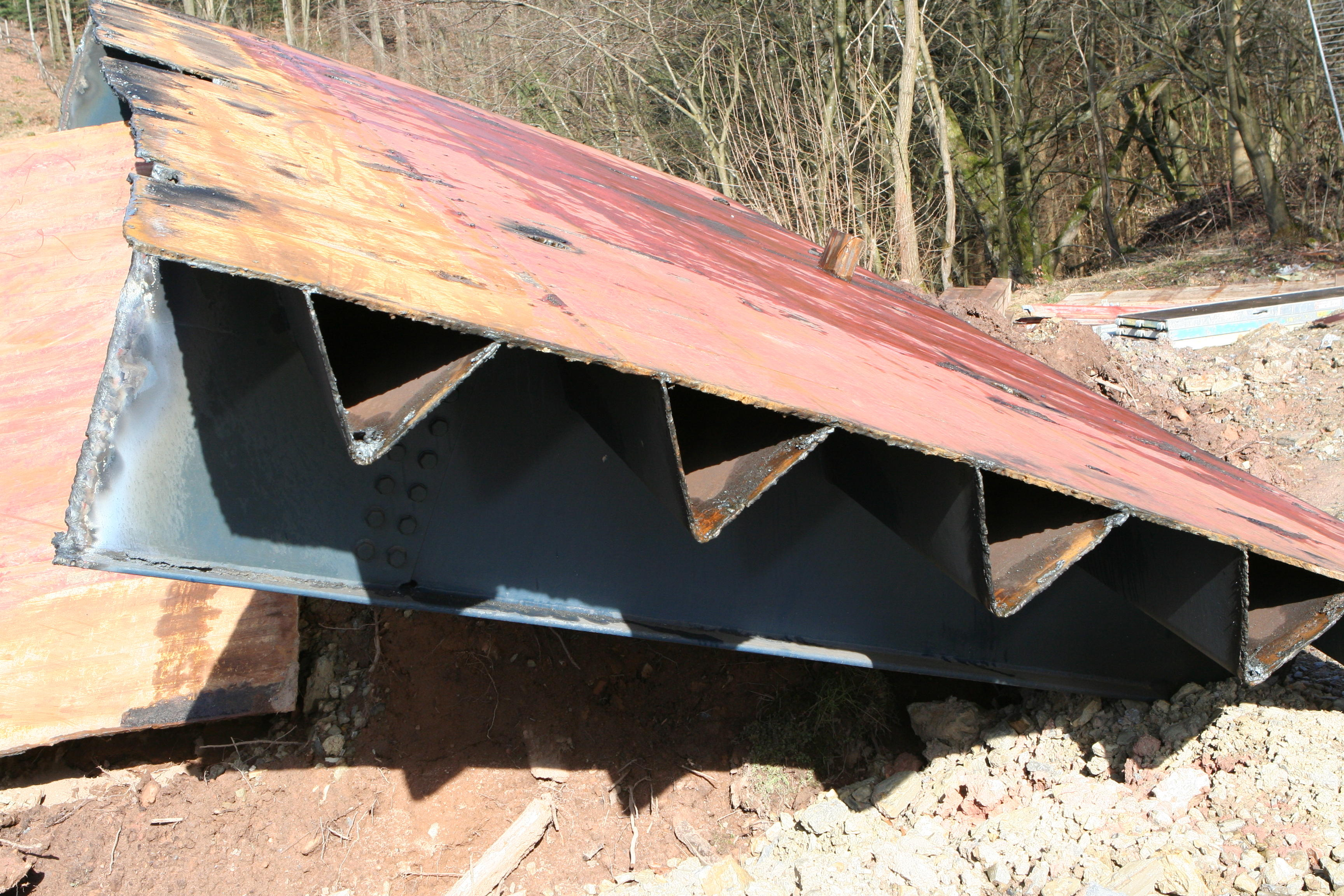 Rest der Fahrbahnplatte der alten Haseltalbrücke